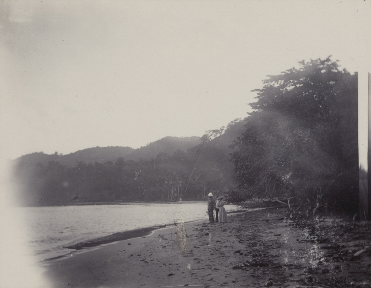 Academische Collecties: 1899-1900, Siboga-expeditie naar Nederlands Oost-Indië, onder leiding van Max Wilhelm Carl Weber Max Weber en Anna Weber-van Bosse lopen langs het strand van de Baai.